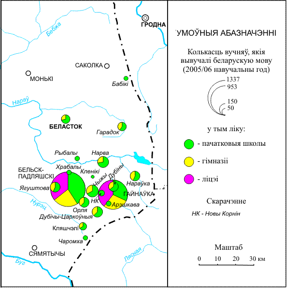 Колькасць вучняў, якія вывучалі беларускую мову ва Усходняй Беласточчыне